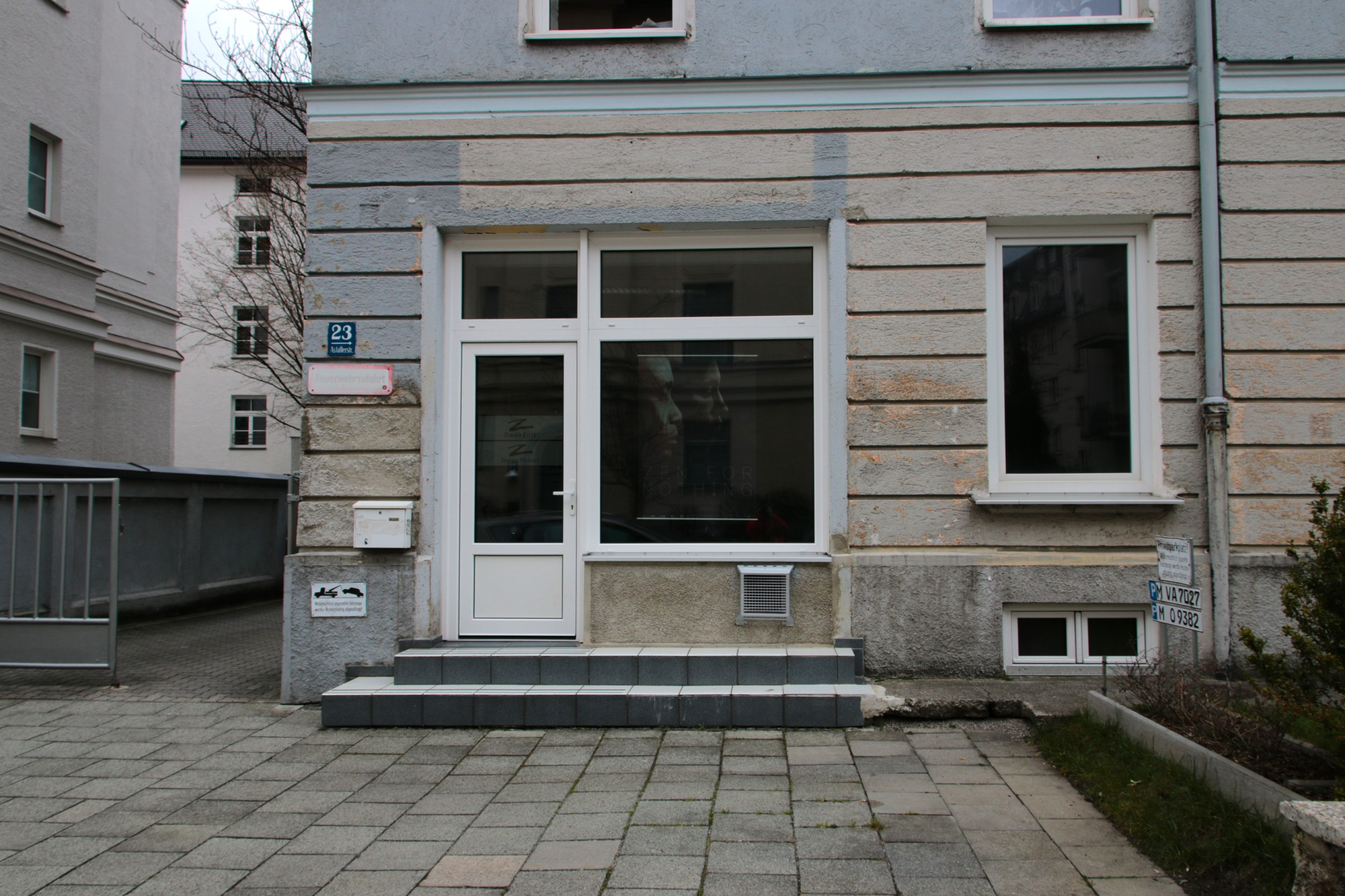 Ladenbüro von Zorro Film in der Astallerstraße 23 in München.